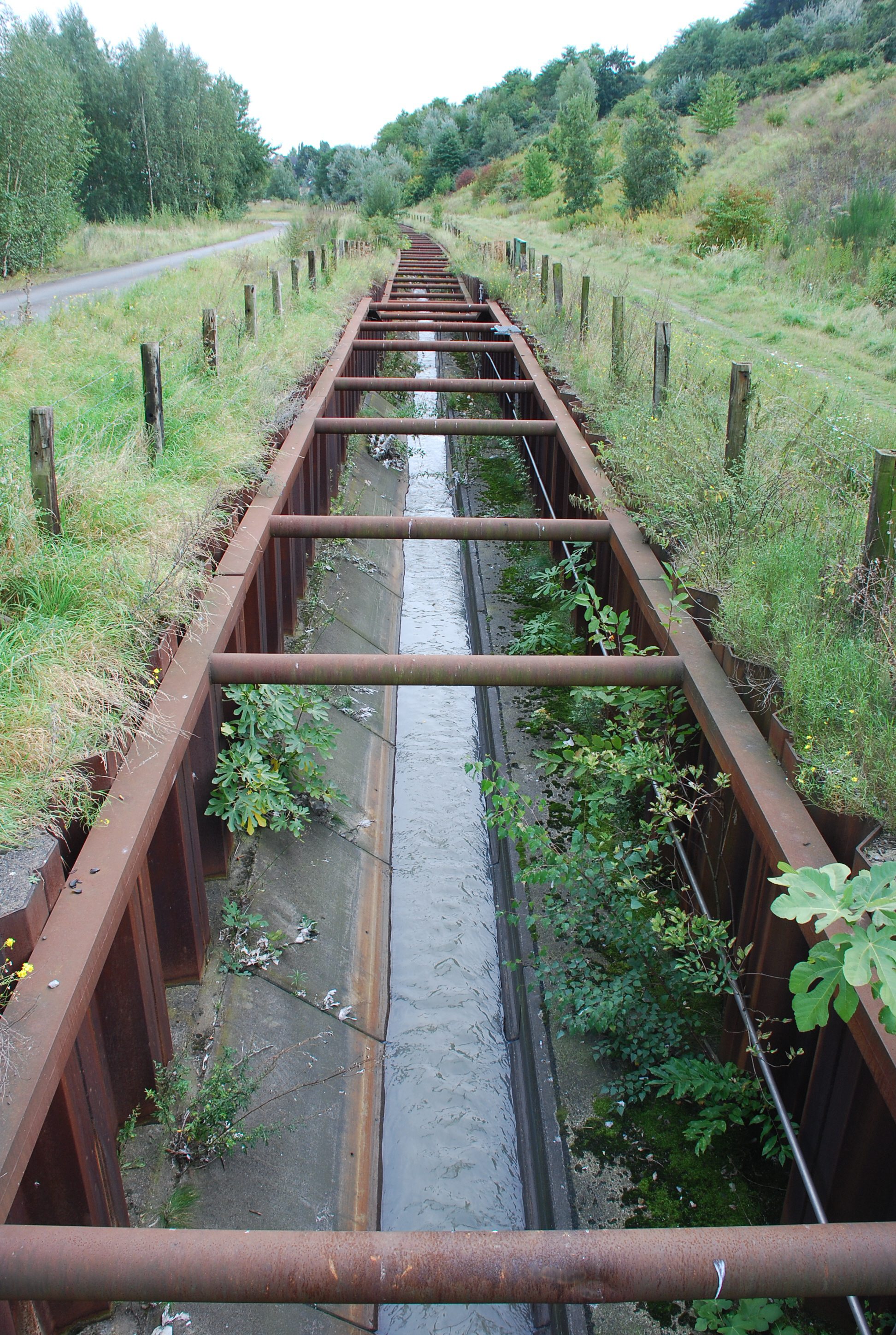 Oberlauf (nicht Ursprung!) des Lanferbaches am Fuß der Halde Rungenberg